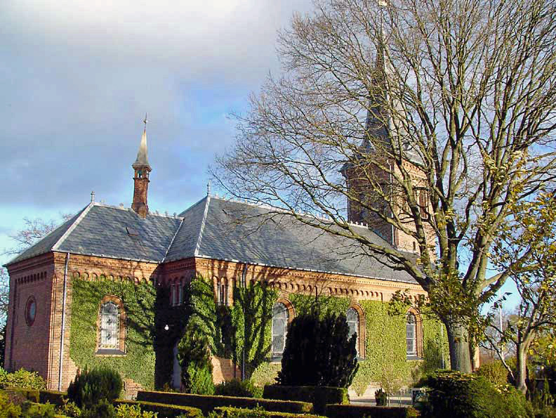 fra sydvest